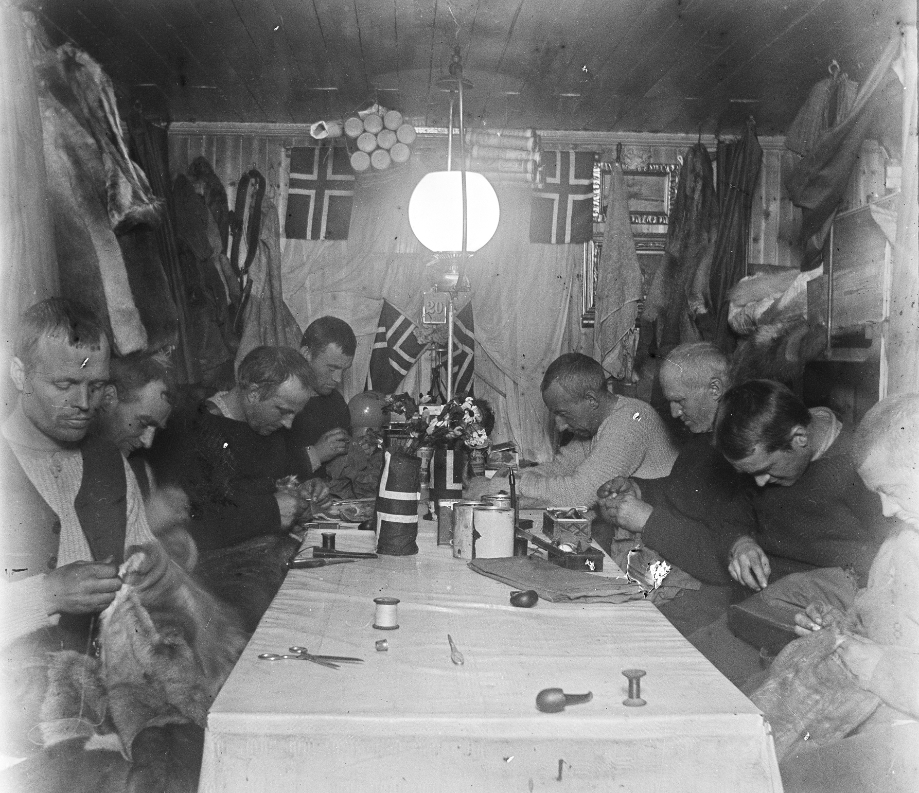 Tittel / Title: I Framheims stue sys det på diverse utstyr Motiv / Motif: Negativ glassplate. Rundt bordet sitter Olav Bjaaland, Sverre Hassel, Oscar Wisting, Helmer Hanssen, Roald Amundsen, Hjalmar Johansen, Kristian Prestrud, og Jørgen Stubberud. Alle mann måtte gjøre en del slikt arbeid. Bl.a. ble skinndraktene som var laget etter eskimoisk mønster sydd om etter mål, nesebeskyttere til solbrillene ble laget, trekkseler til hundene ble modifisert. Dato / Date: 1911 Fotograf / Photographer: ukjent / unknown Sted / Place: Antarktis, Hvalbukta, Framheim Eier / Owner Institution: Nasjonalbiblioteket / National Library of Norway Lenke / Link: Bildesignatur / Image Number: bldsa_NPRA1482